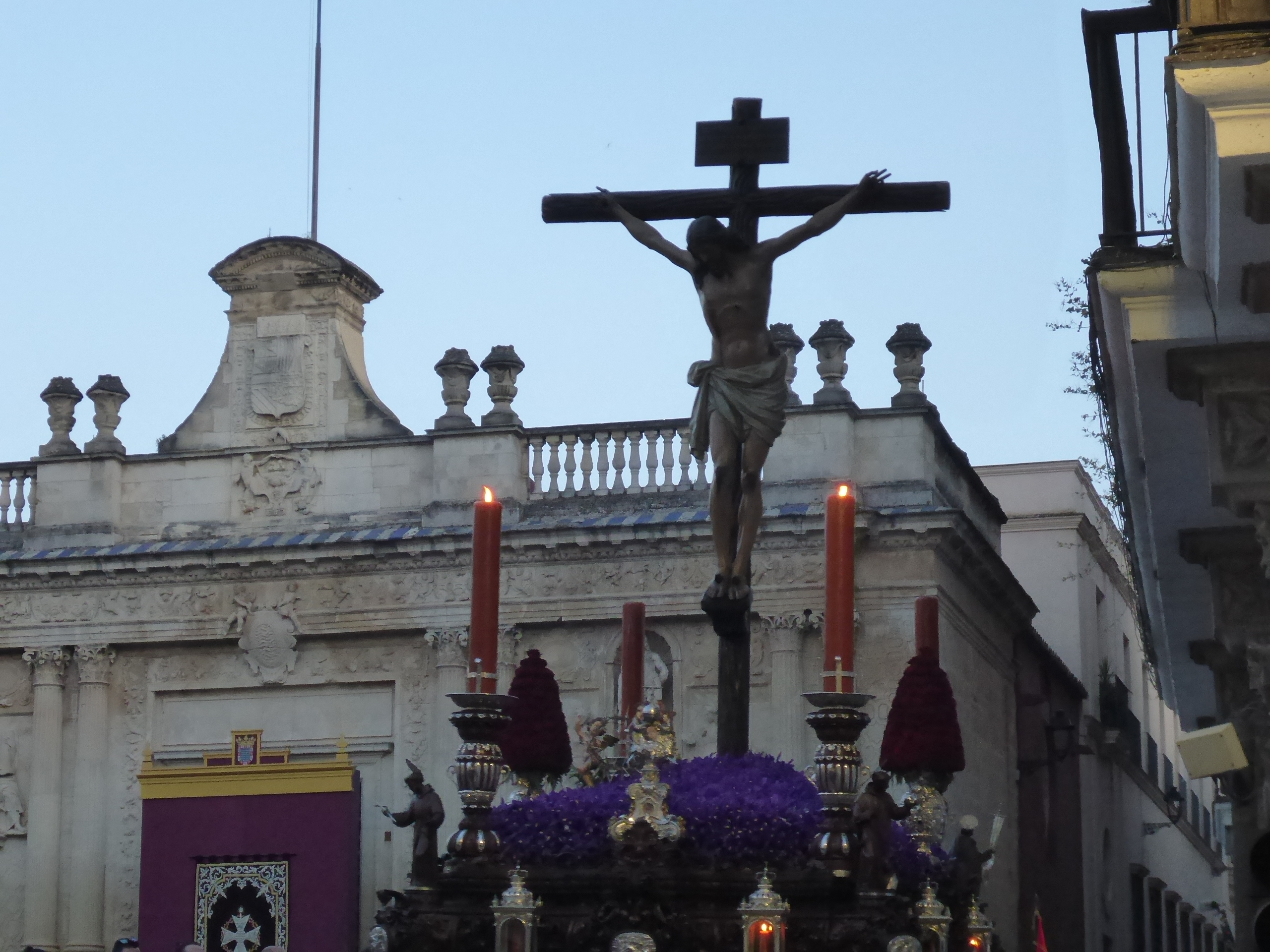 Hermandad de la Defensión (Jerez)